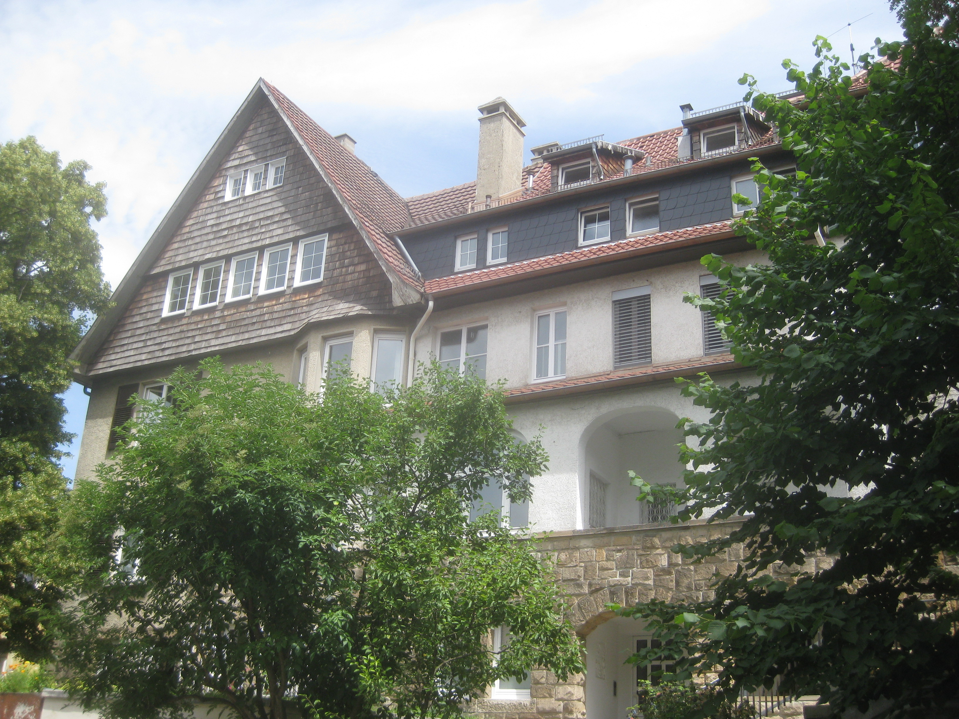 Doppelvilla, Stuttgart, Fraasstraße 5-7. Architekt: Albert Eitel, Bauherr: Anna Schiedmayer, Frau von Max Schiedmayer; Baujahr: 1923.